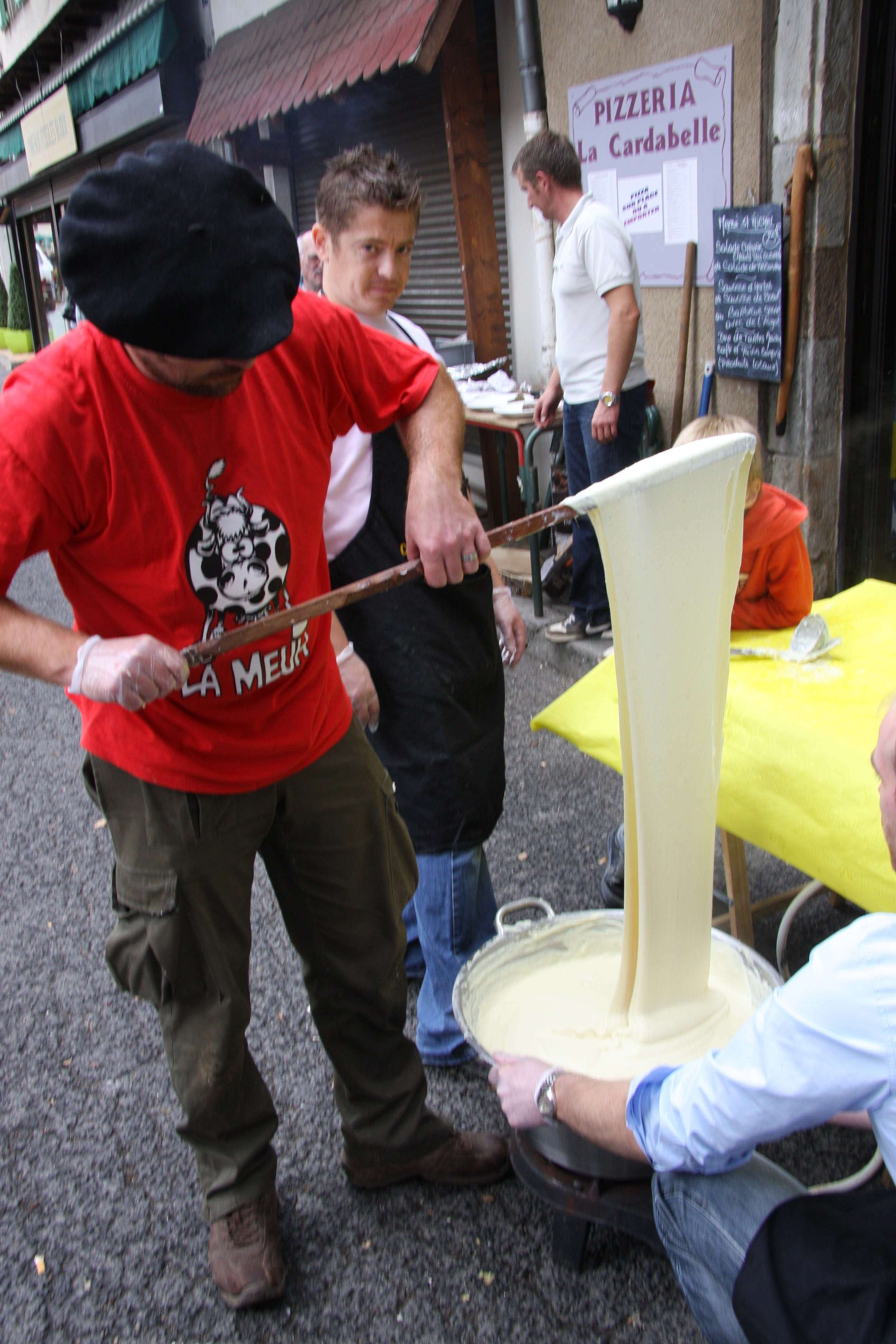 Animation à la foire de la Saint-Michel de Meyrueis : confection de l'aligot